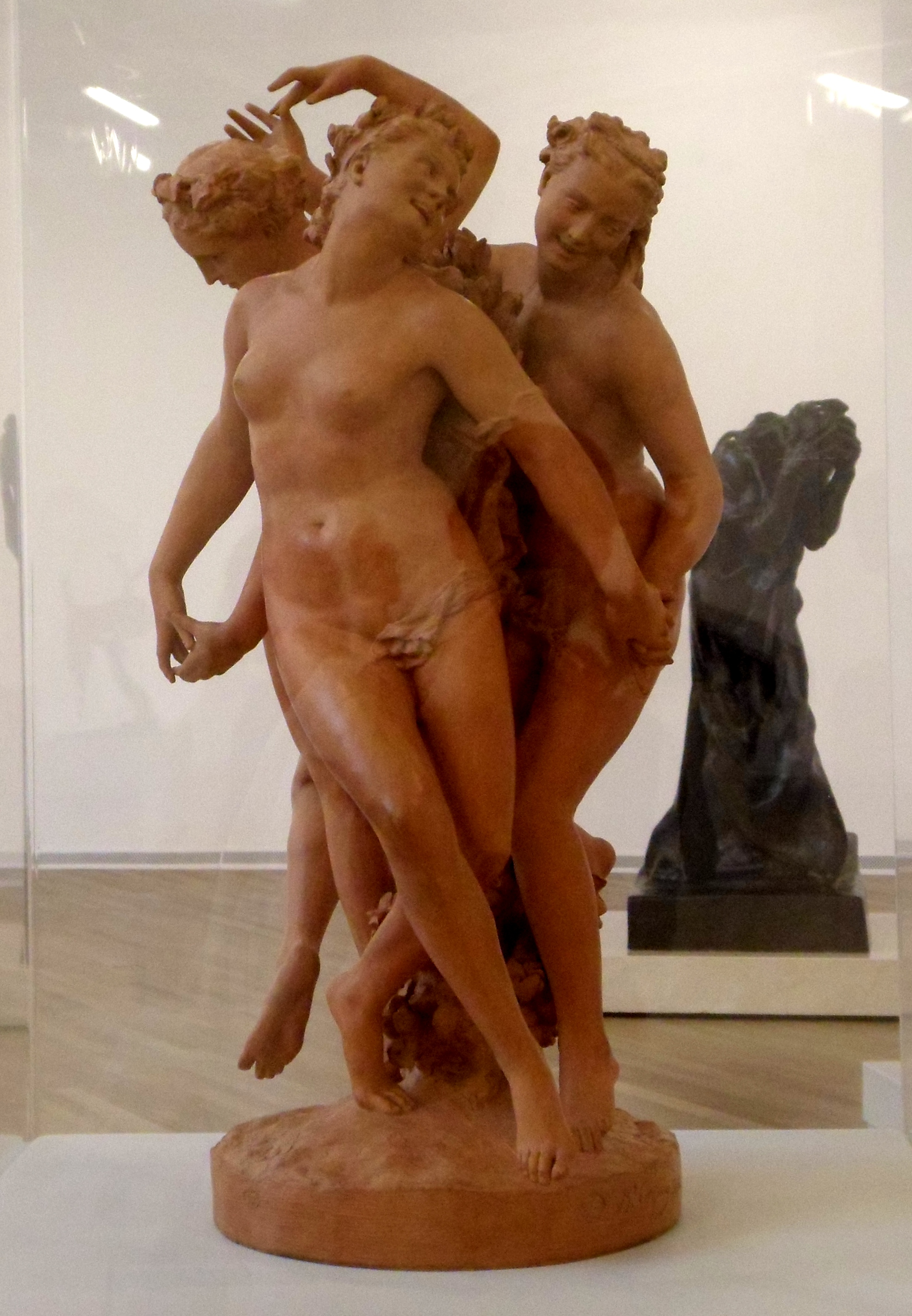 Escultura en terracota representando a las Cárites. El grupo formó parte de la fachada de la Ópera de París.